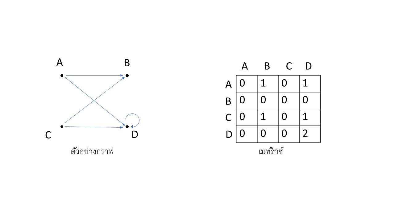 การแทนค่าลงในเมตริกซ์ในกรณีที่กราฟมีการวนลูป